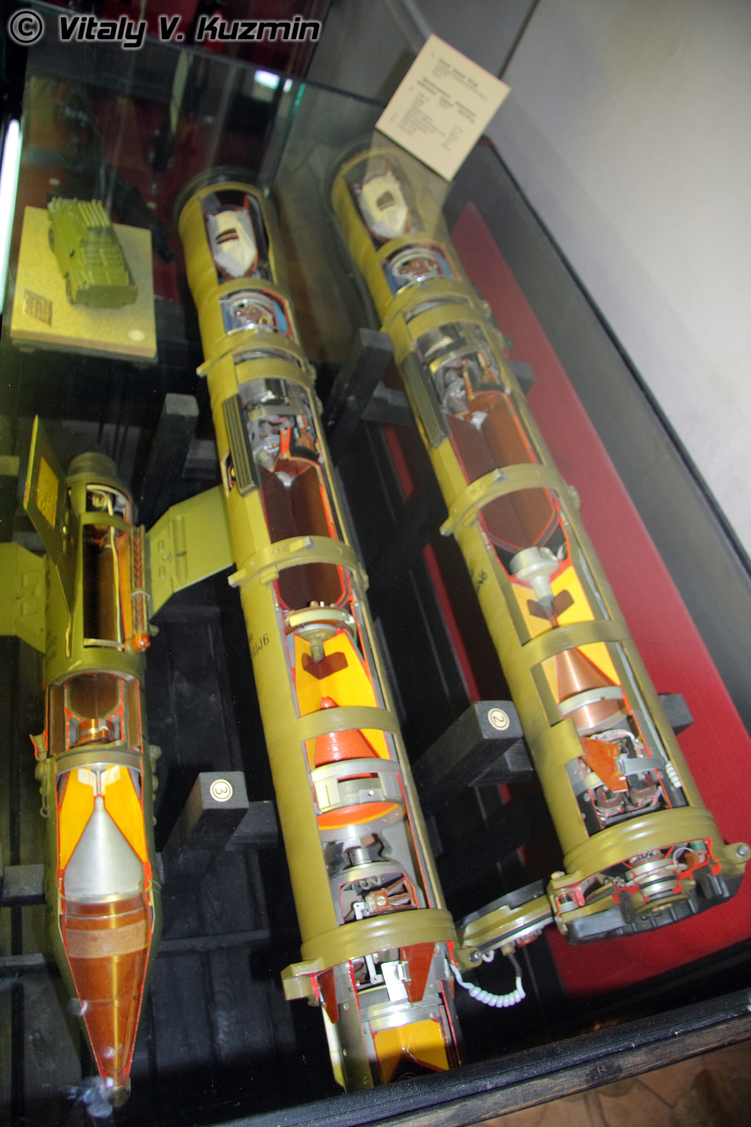 ПТУРСы 9М113, 9М113М и 9М14П1 (9M113, 9M113M and 9M14P1 ATGMs)